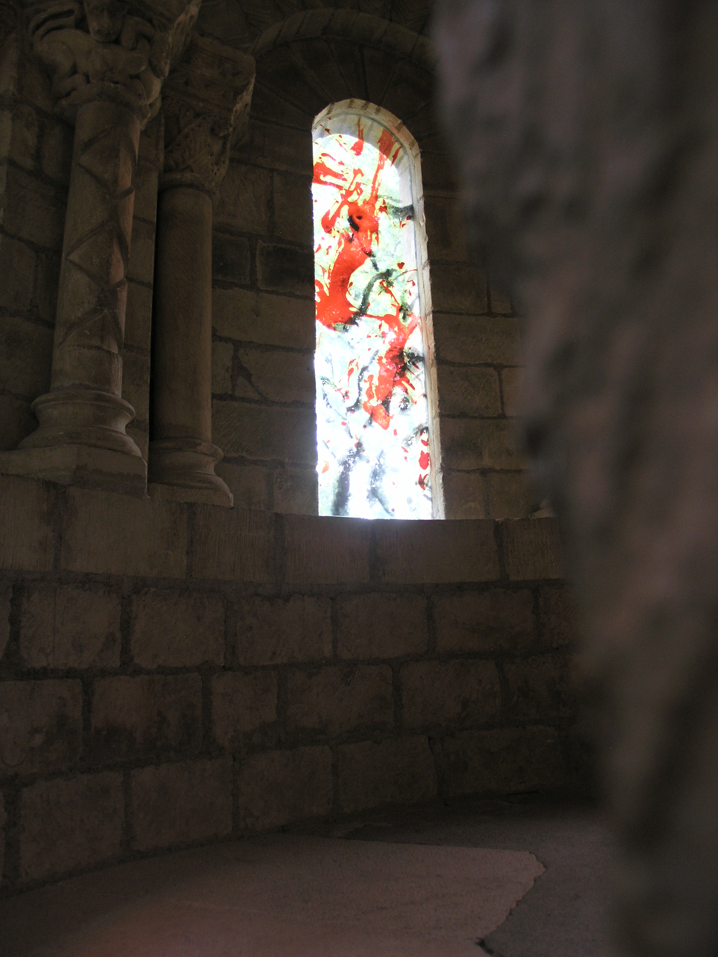 Fenster von Zao Wou-Ki im romanischen Refektorium der Prieuré de Saint-Cosme